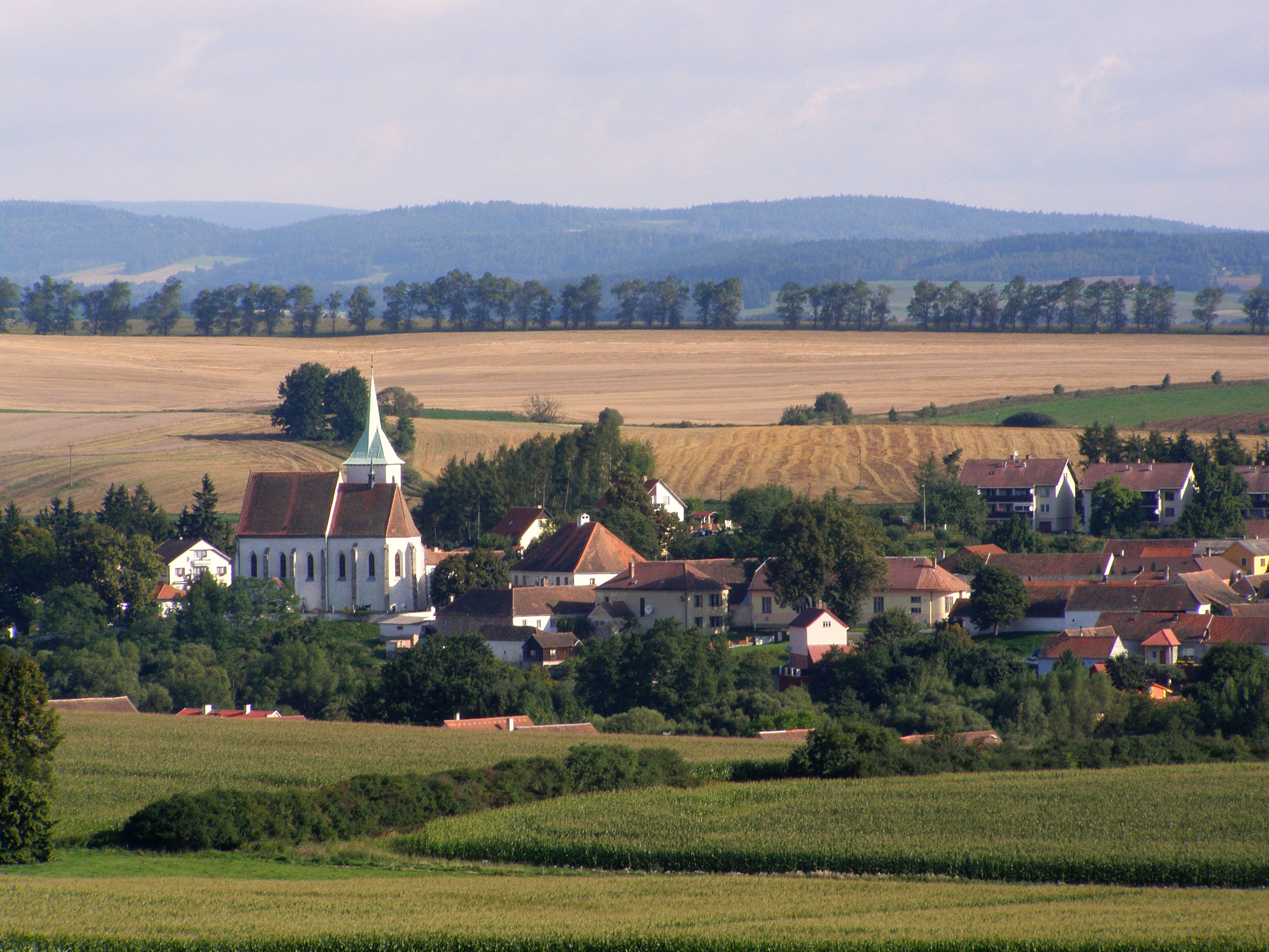 Cizkrajov, pohled z úbočí Montserratu, Dačická kotlina